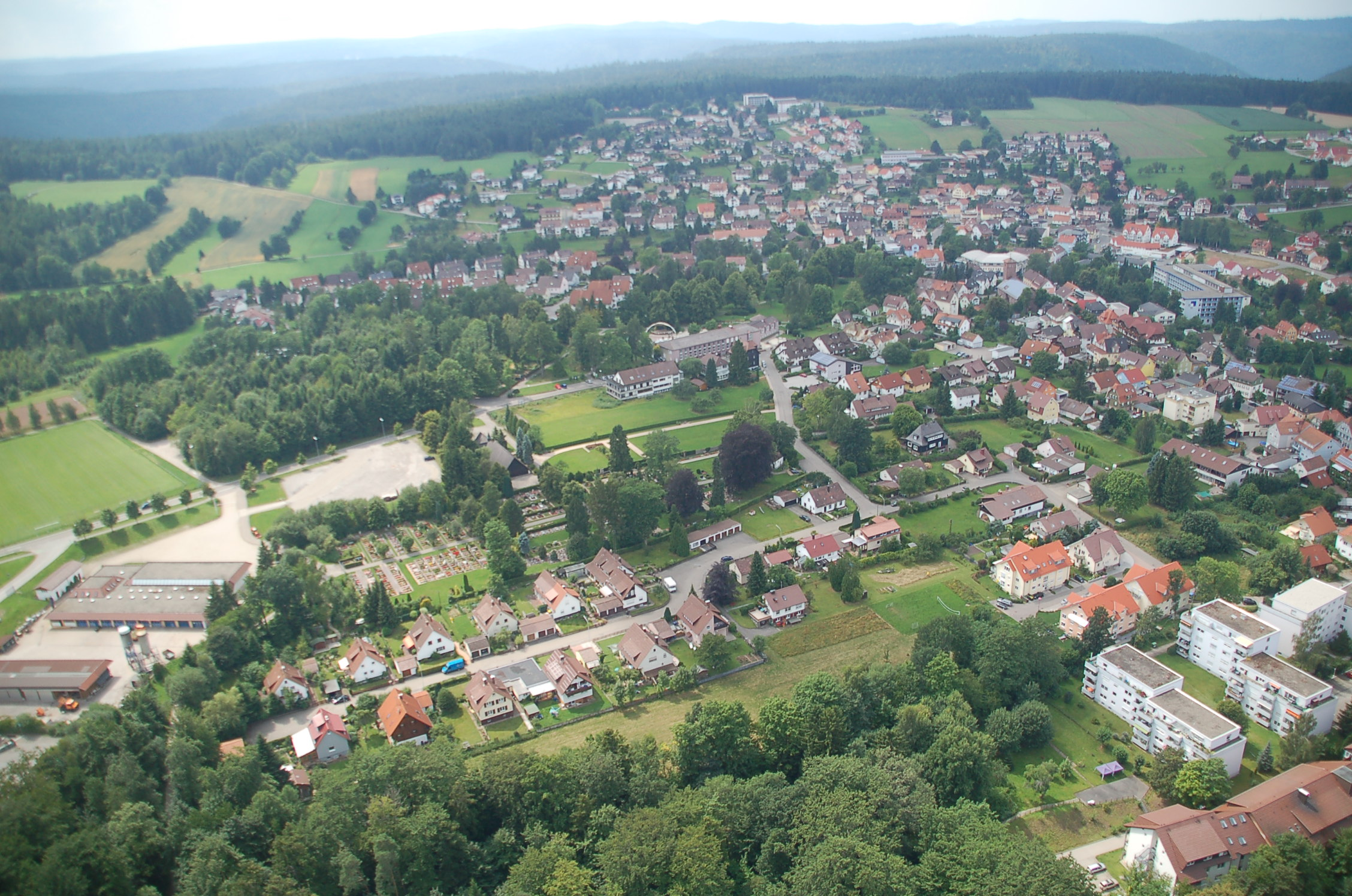 Blick über Schömberg. In der Bildmitte das Kurhaus mit dem Kurpark